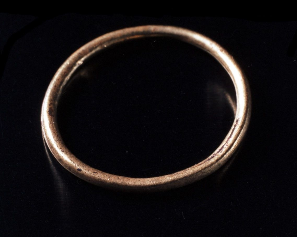 Fingerring av gull fra førromersk jernalder. Funnet i en branngrav på Bøli i Østfold.